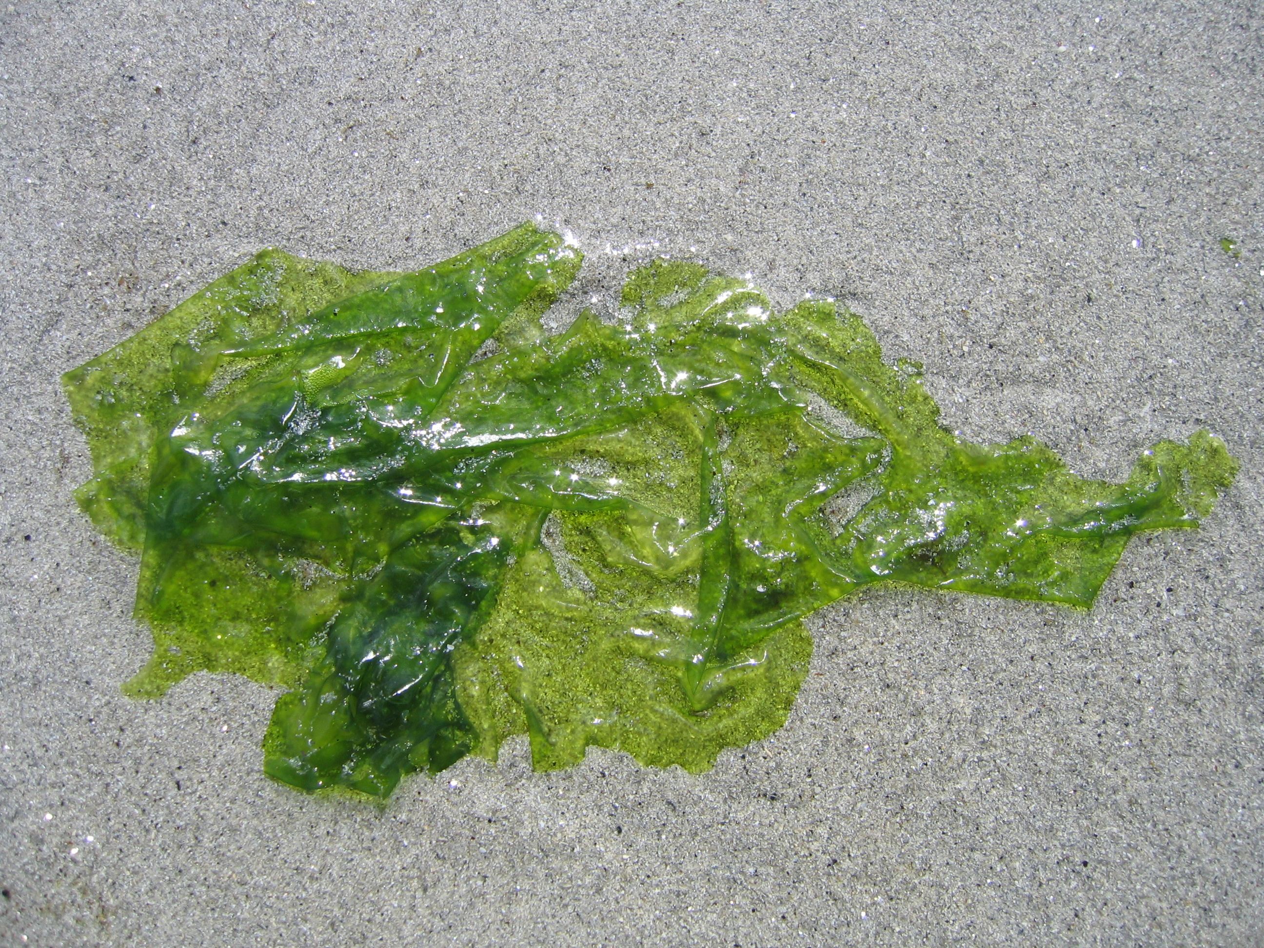 Des algues Ulva Armoricana lors d'une marée verte dans le nord Finistère.